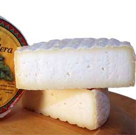 Queso Canal de Ciercos